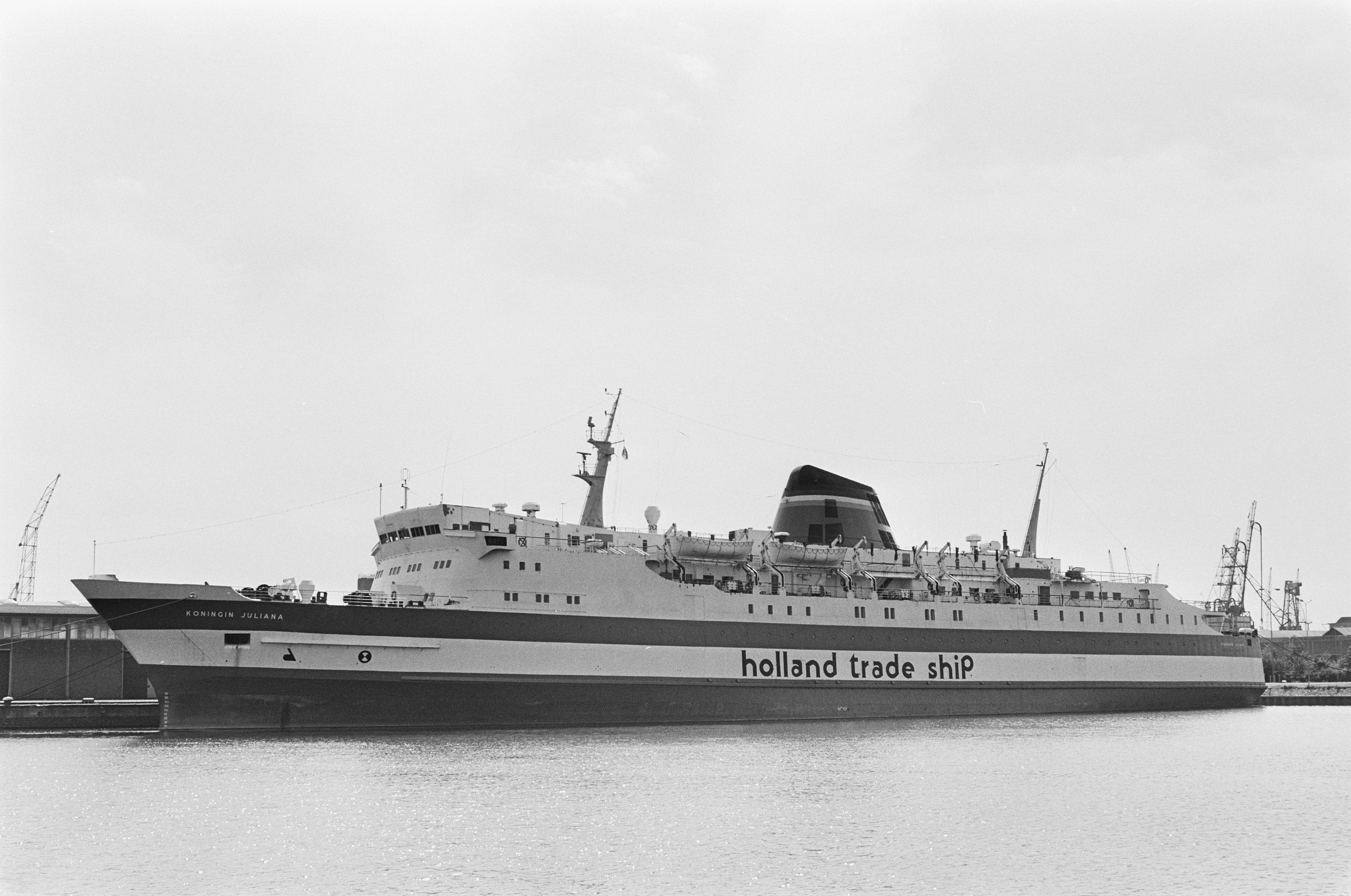 Collectie / Archief : Fotocollectie Anefo Reportage / Serie : [ onbekend ] Beschrijving : Het voormalige Holland Trade Ship in de Coenhaven in Amsterdam. Holland Trade Ship (IMO 6808806) Datum : 15 augustus 1985 Locatie : Amsterdam, Noord-Holland Persoonsnaam : COENHAVEN Fotograaf : Vollebregt, Sjakkelien / Anefo Auteursrechthebbende : Nationaal Archief Materiaalsoort : Negatief (zwart/wit) Nummer archiefinventaris : bekijk toegang 2.24.01.05 Bestanddeelnummer : 933-3975